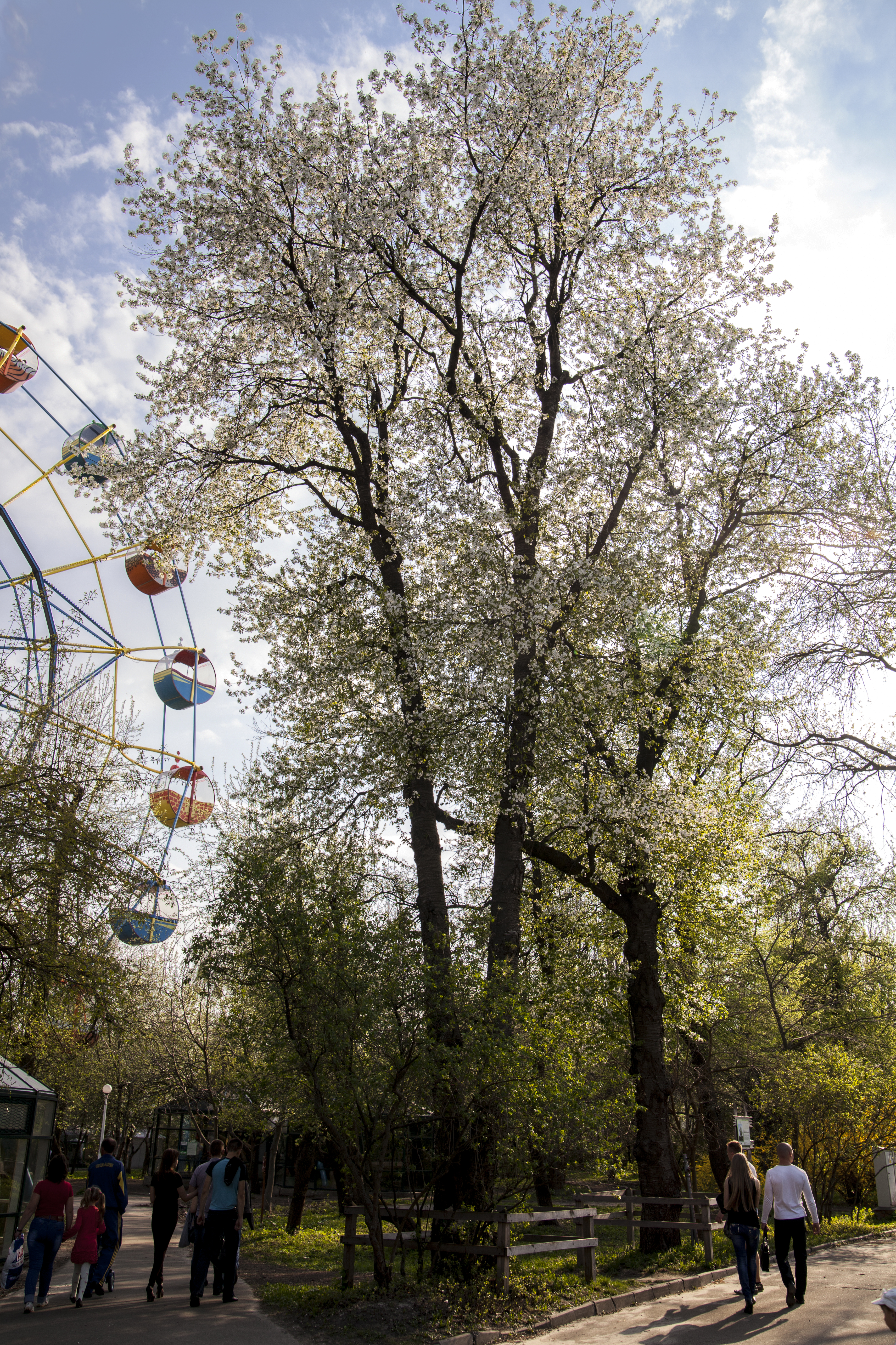 Більш, ніж 120 років. Обсяг 2,2—2,7 м. Висота 10 м. Найстаріші черешні Києва. У 2008 році проведене лікування.